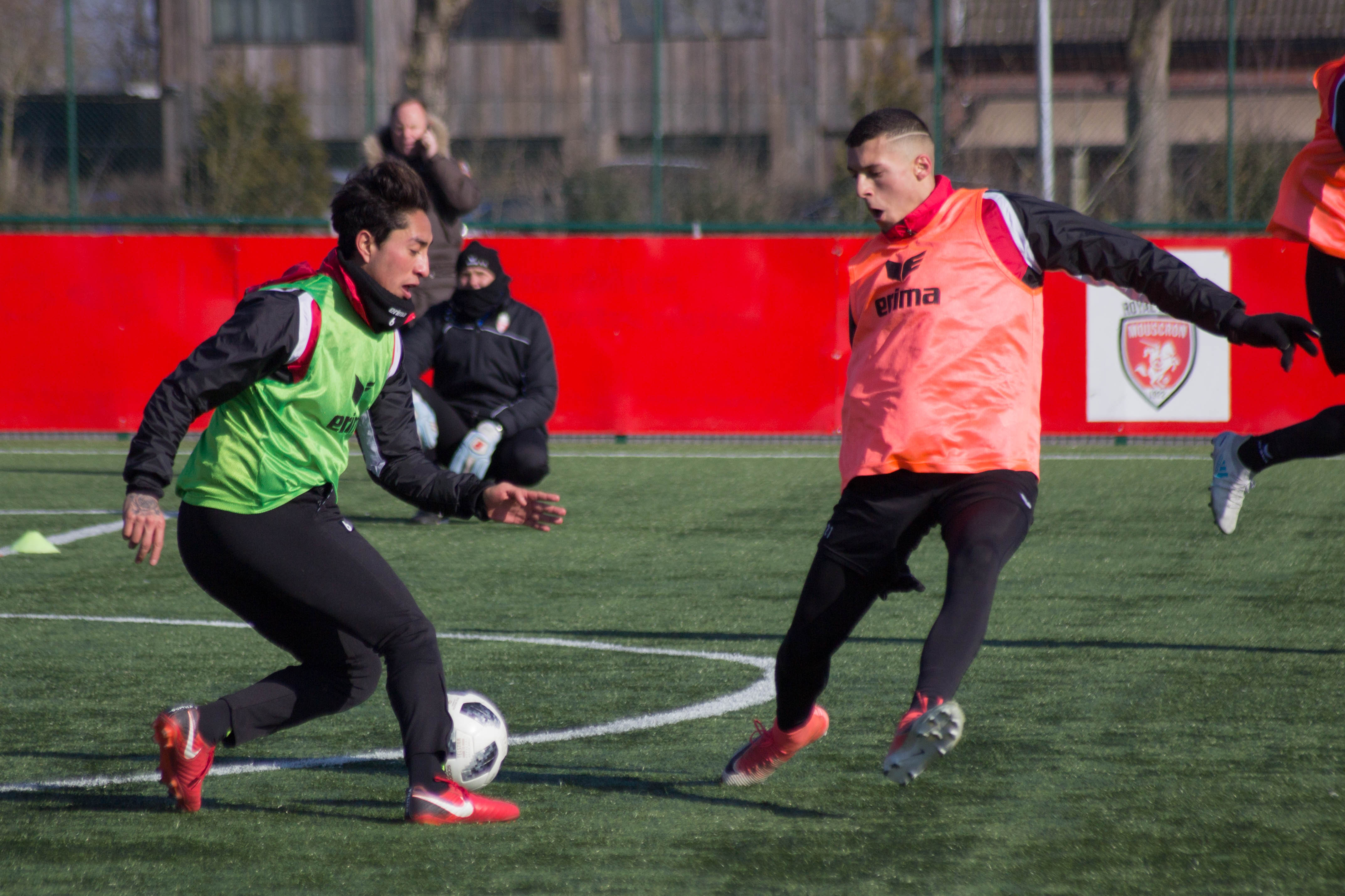 Entraînement du Royal Excel Mouscron, au Futurosport( Mouscron). Le 22 février 2018.